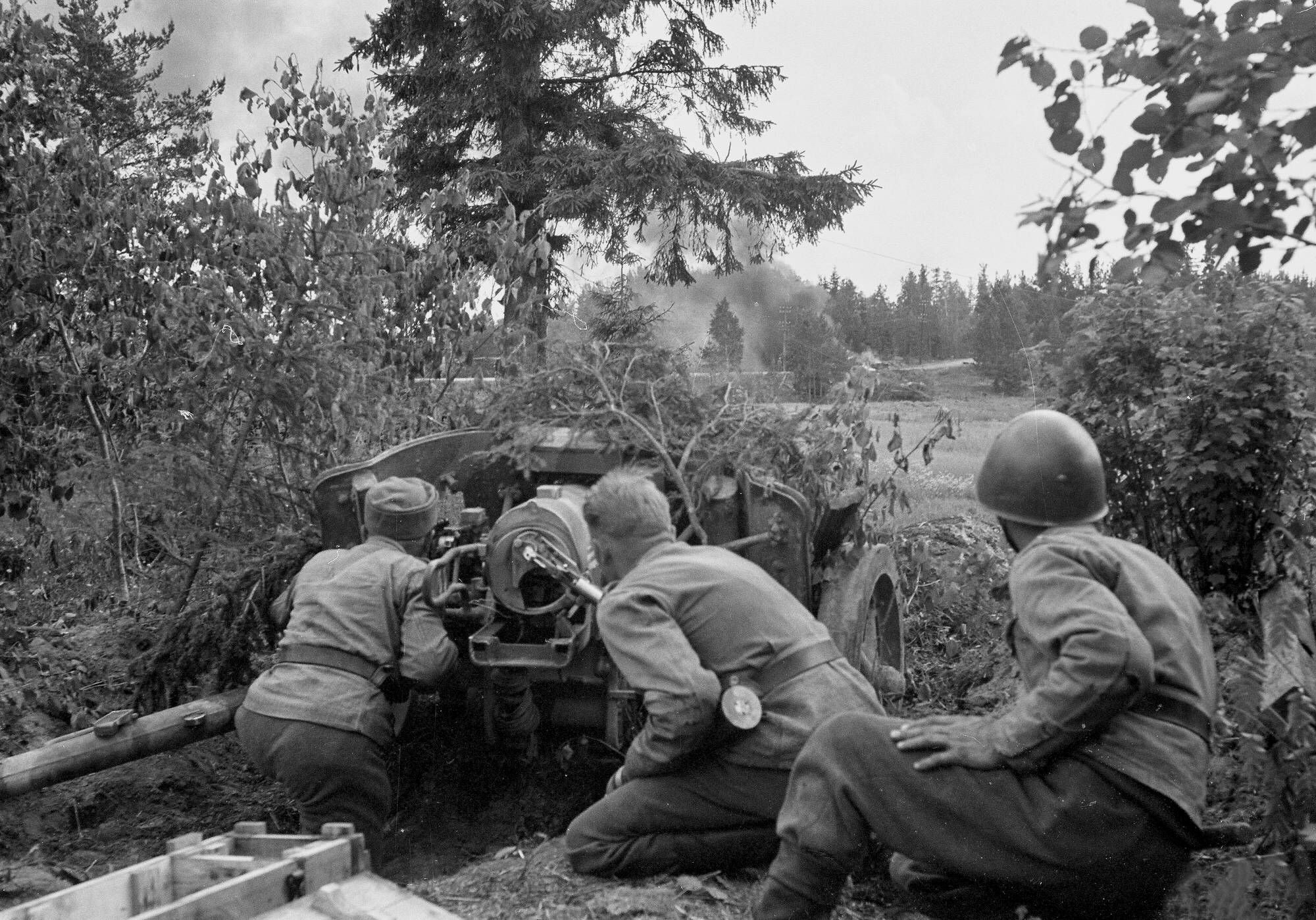 Panssaritorjuntatykki ja sen tuhoama hyökkäysvaunu. Ihantala 1944.06.30